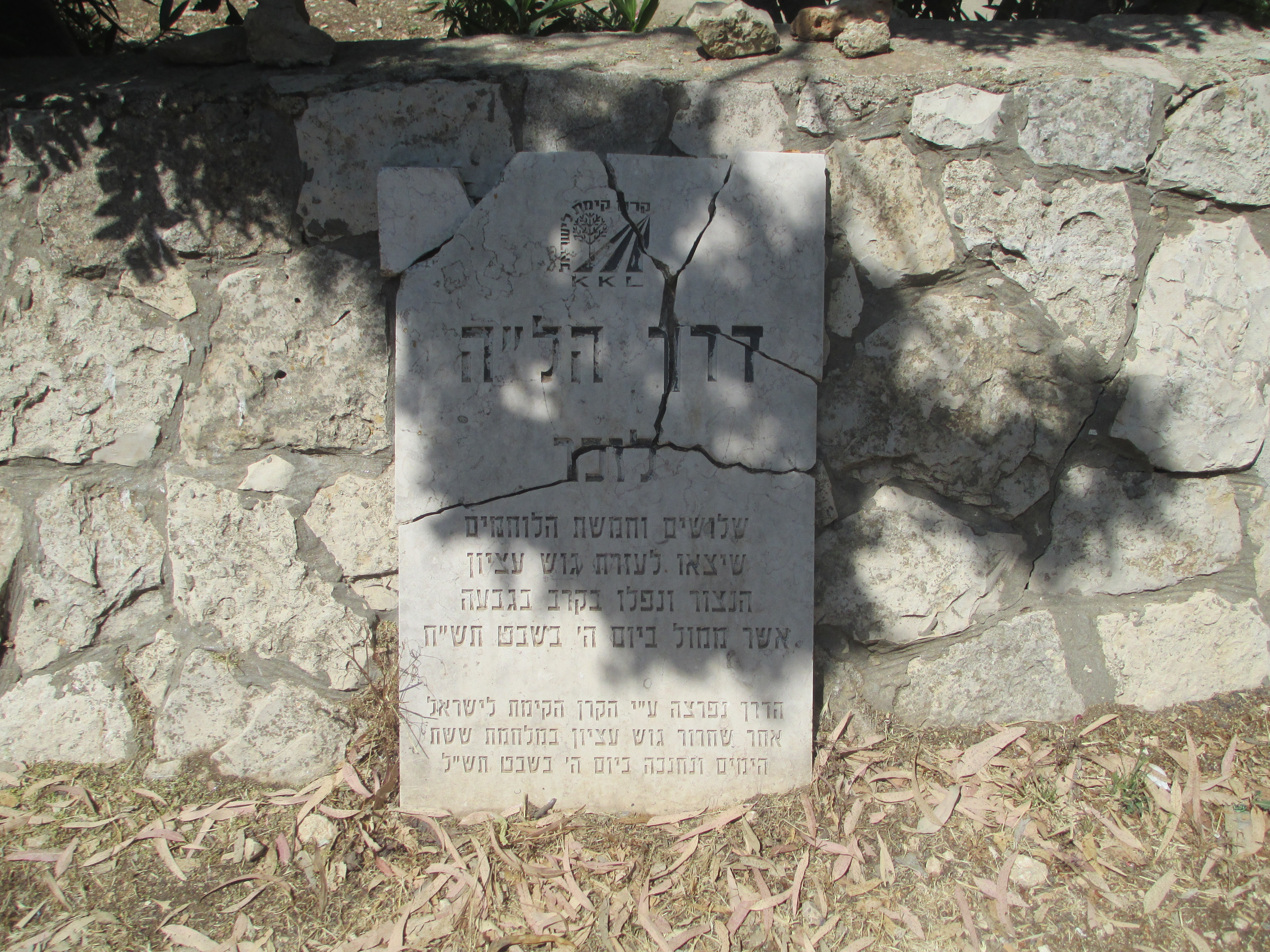 שלט כביש דרך הל"ה (כביש 367) בבית ספר שדה גוש עציון